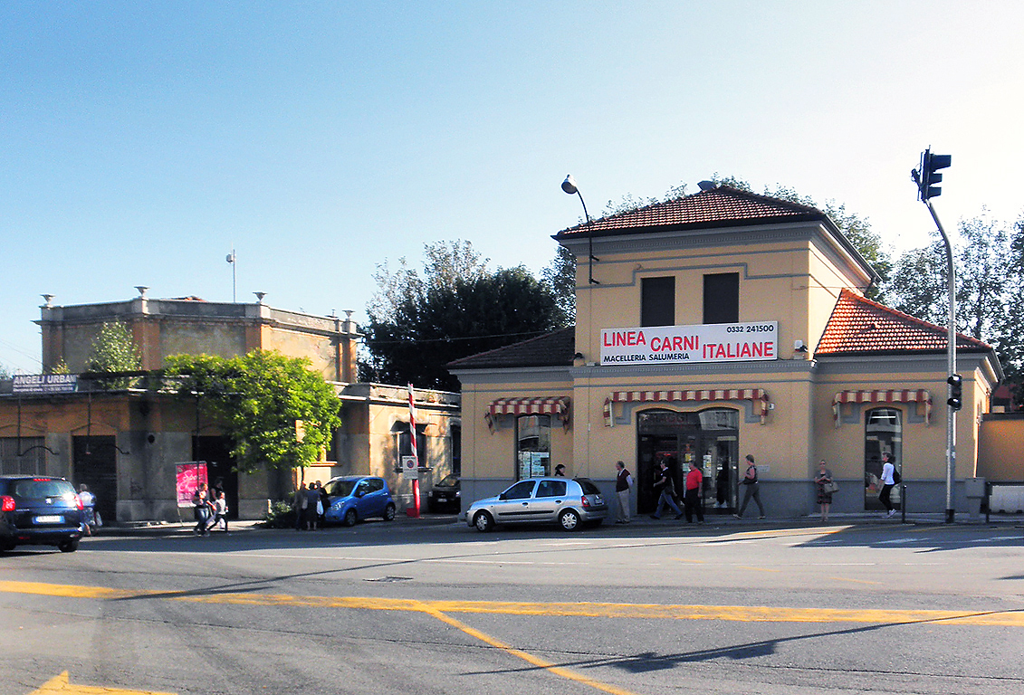 Ex stazione tranviaria SVIE a Varese.